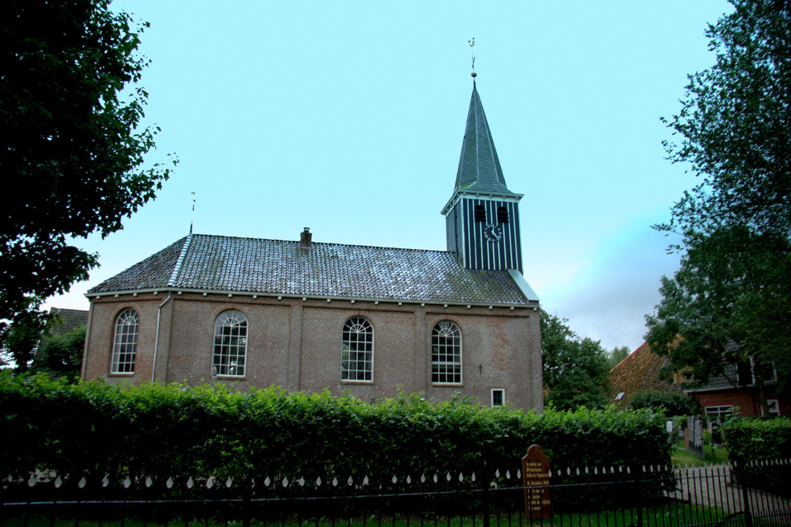 Kerkje Poppingawier